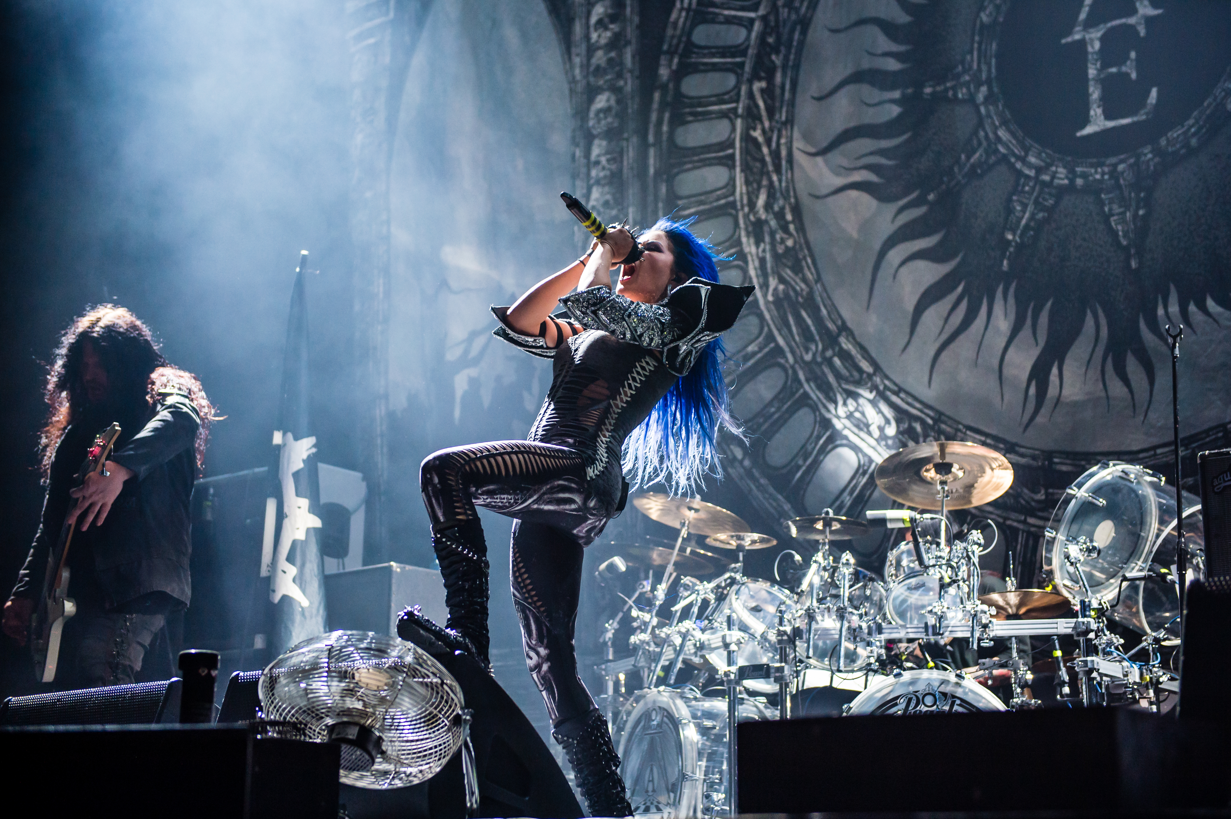 'Arch Enemy - Support für Nightwish Endless forms most beautiful Tour 2015 Oberhausen'